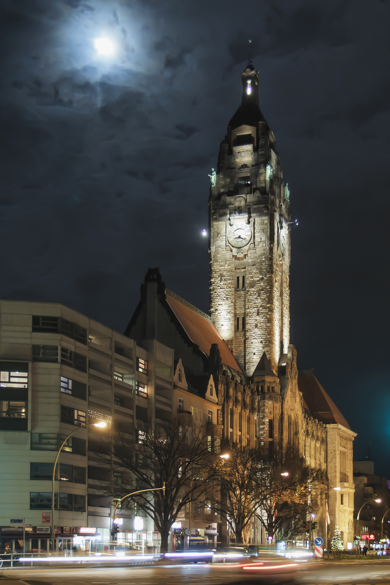 Berlin - Rathaus Charlottenburg - Nacht - 2011